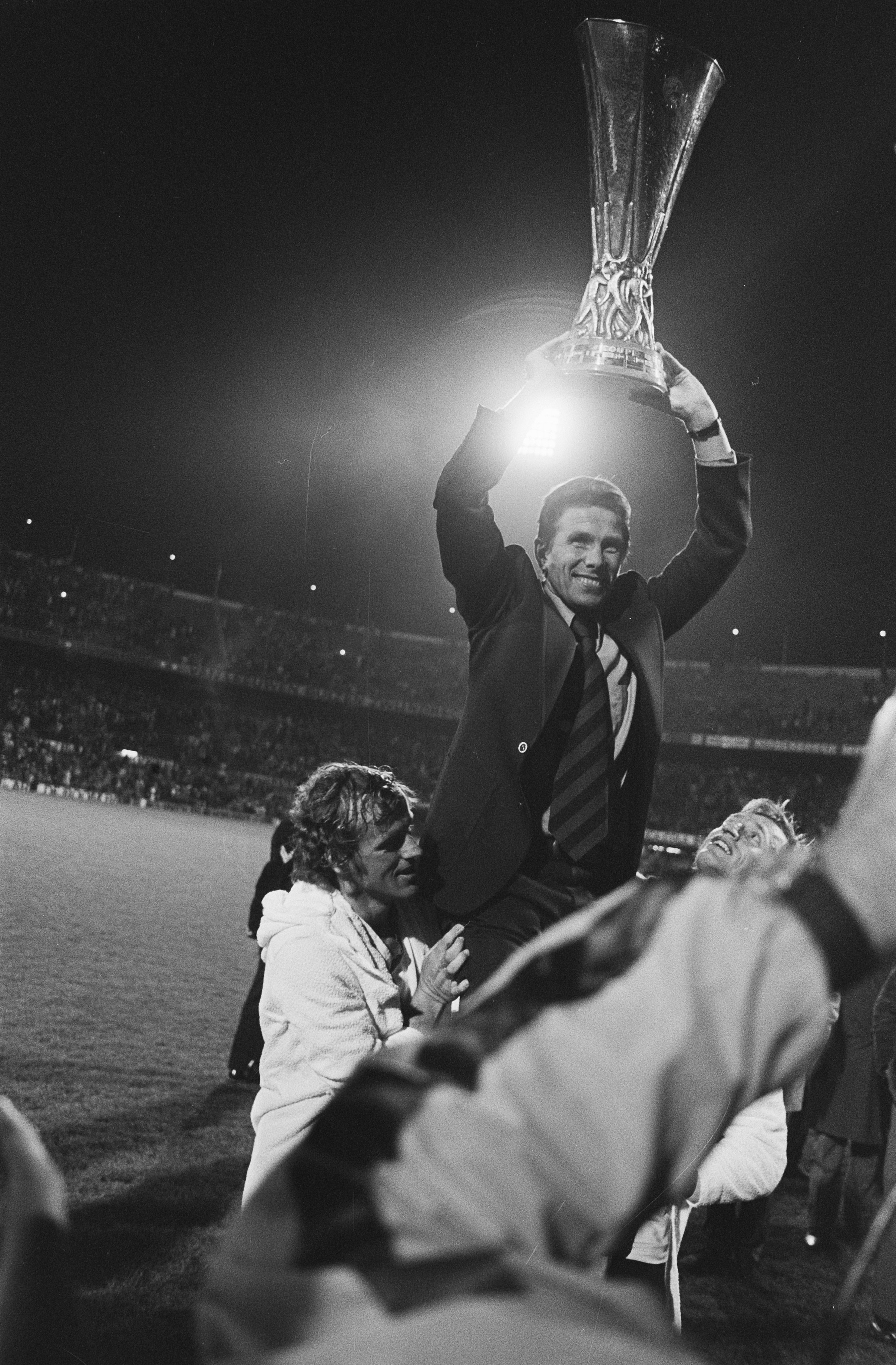 Collectie / Archief : Fotocollectie Anefo Reportage / Serie : [ onbekend ] Beschrijving : Feyenoord tegen Tottenham Hotspur 2-0, finale UEFA Cup trainer Coerver met UEFA Cup Datum : 29 mei 1974 Trefwoorden : finales, sport, trainers, voetbal Persoonsnaam : Coerver, Wiel Instellingsnaam : Feyenoord, Tottenham Hotspur, UEFA Cup Fotograaf : Mieremet, Rob / Anefo Auteursrechthebbende : Nationaal Archief Materiaalsoort : Negatief (zwart/wit) Nummer archiefinventaris : bekijk toegang 2.24.01.05 Bestanddeelnummer : 927-2222